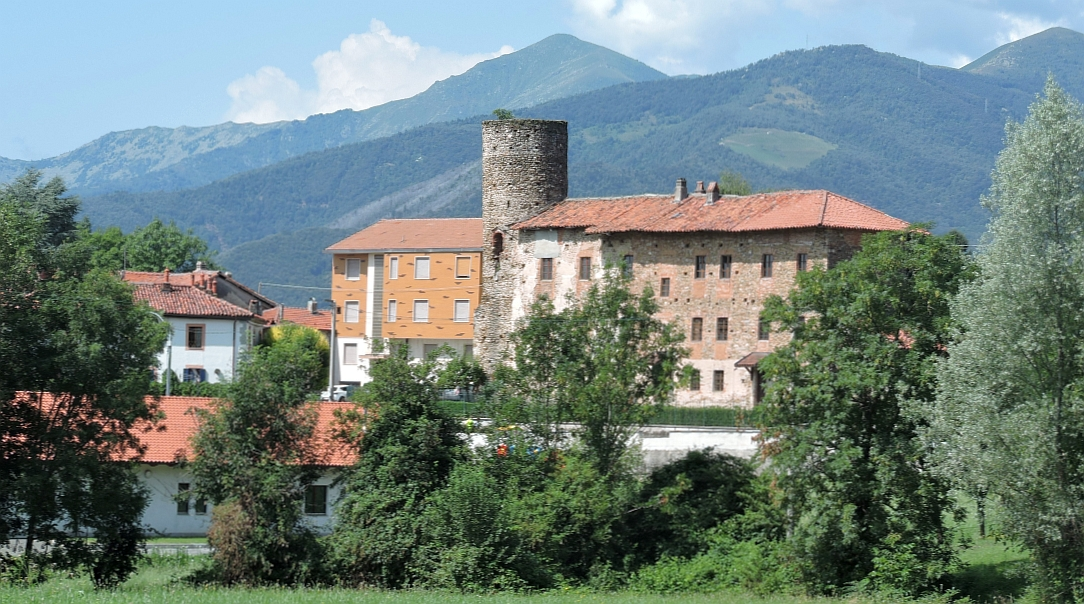 Colleretto Castelnuovo castello sullo sfondo monte Soglio e cima Mares